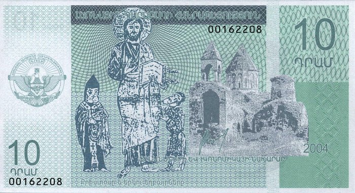 10 Dram